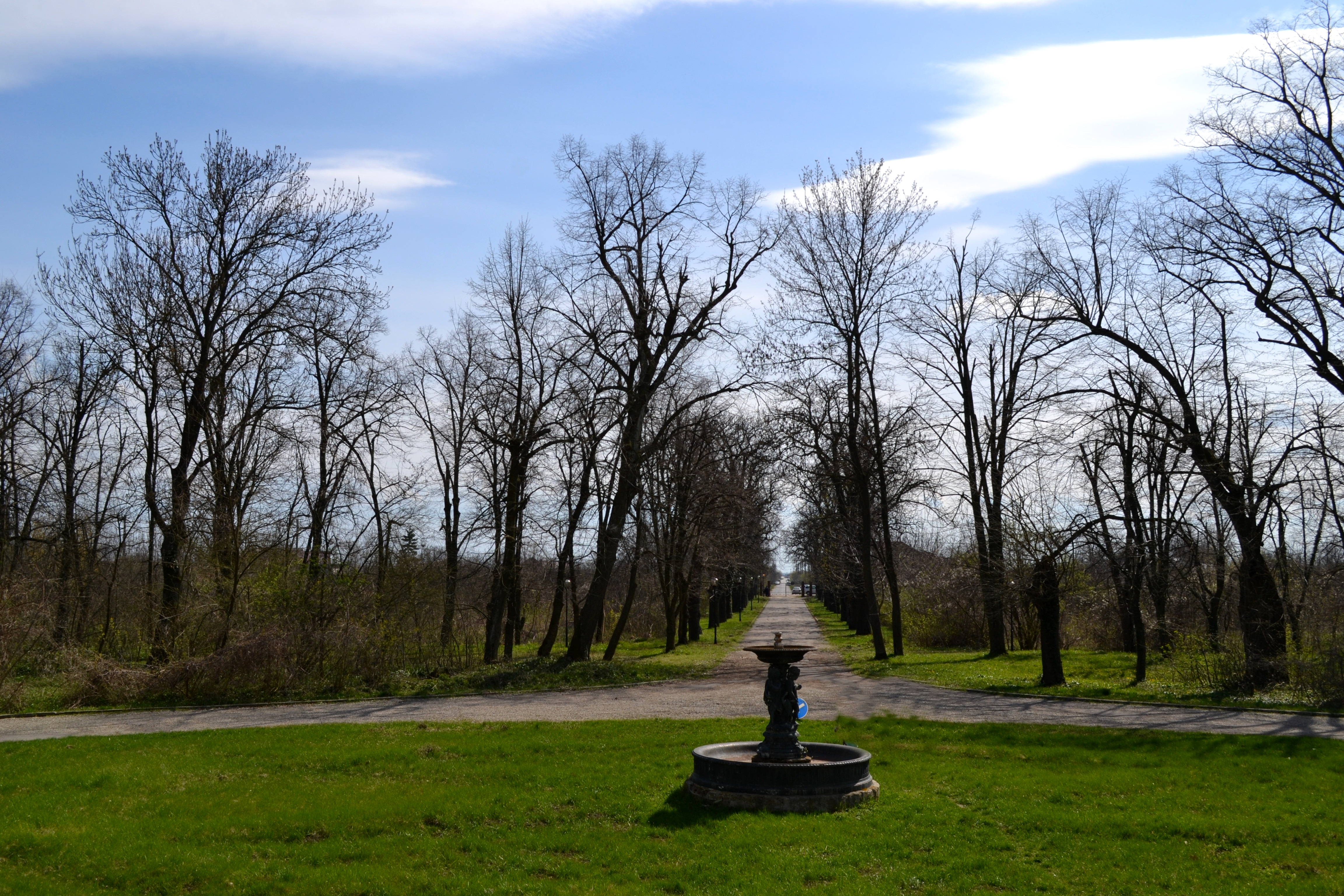 Parcul palatului din Căciulați 01